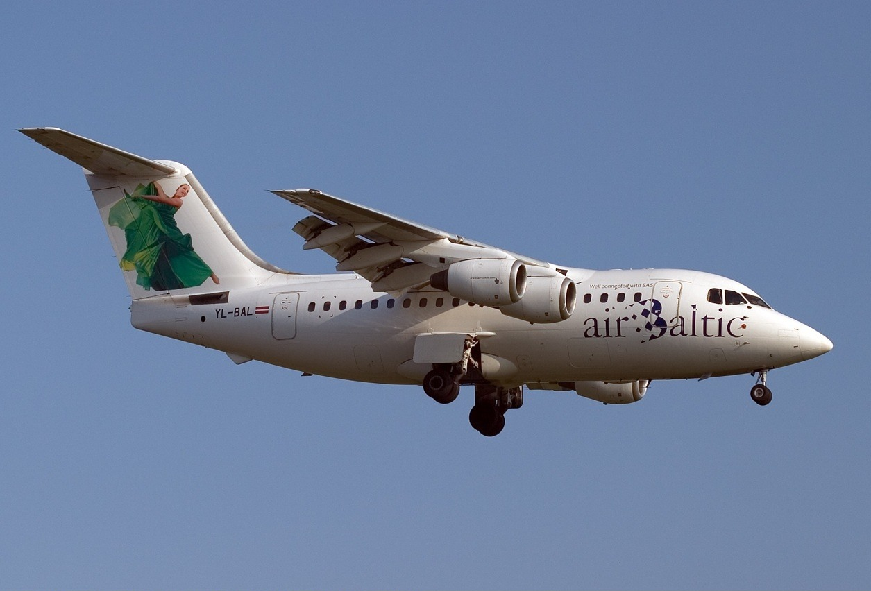 Avro RJ70 der Air Baltic mit freundlicher Genehmigung von Thomas Drebert